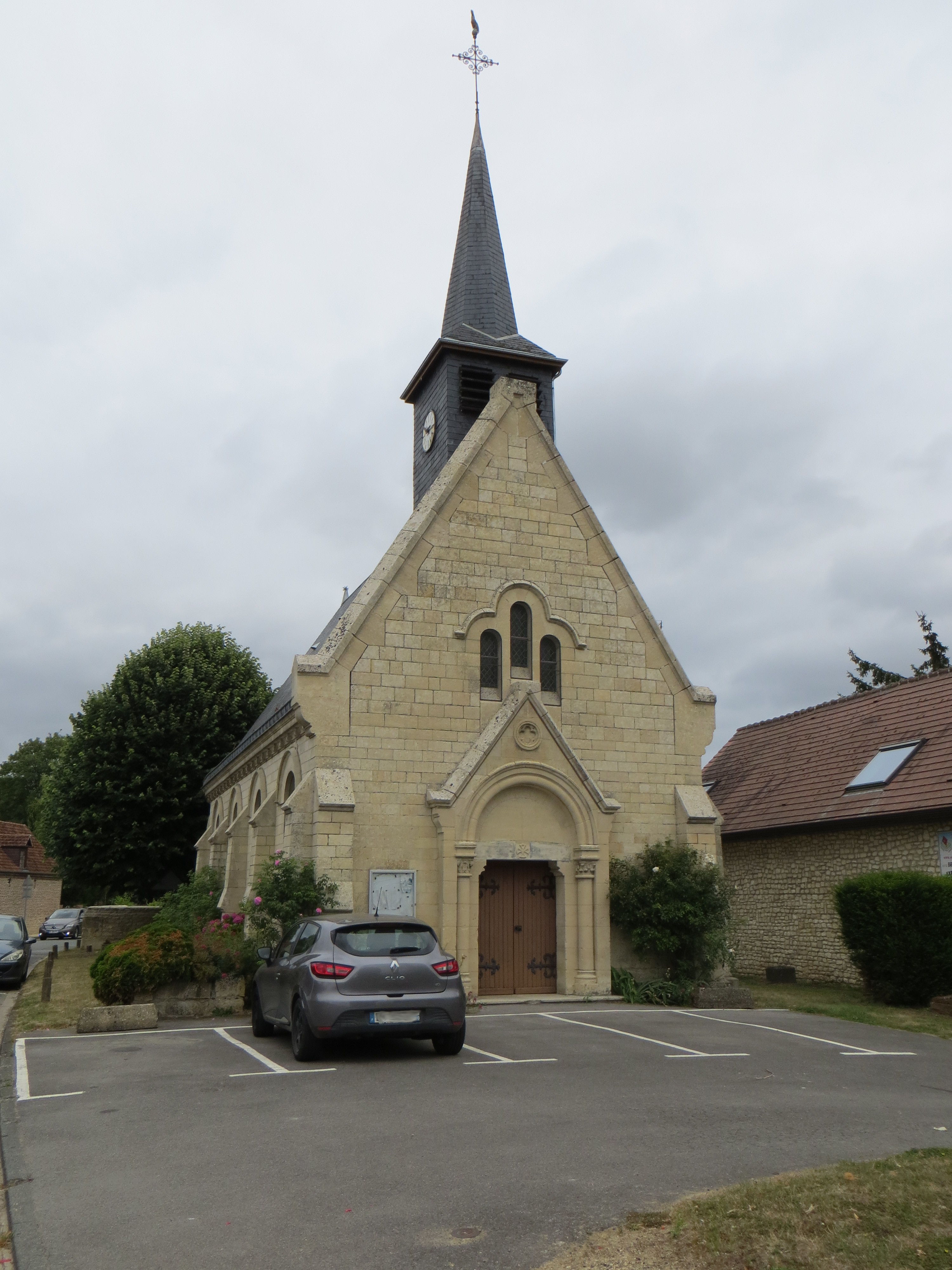 Vue générale de l'église